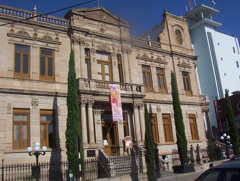 Museo Regional del Estado (casa del aguacate) Salvador Barera Rodriguez Agosto 2005